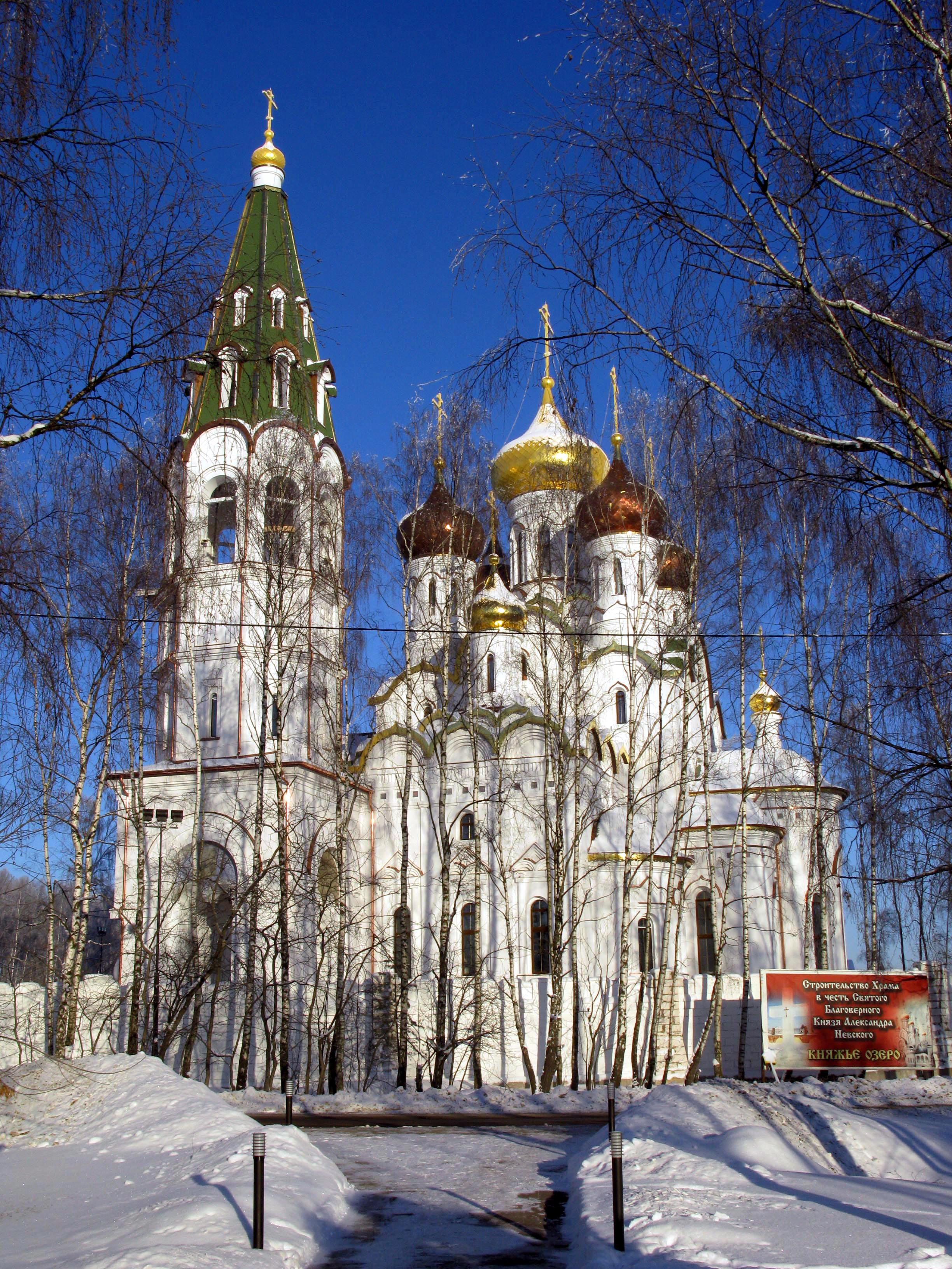 Храм Святого Благоверного князя Александра Невского